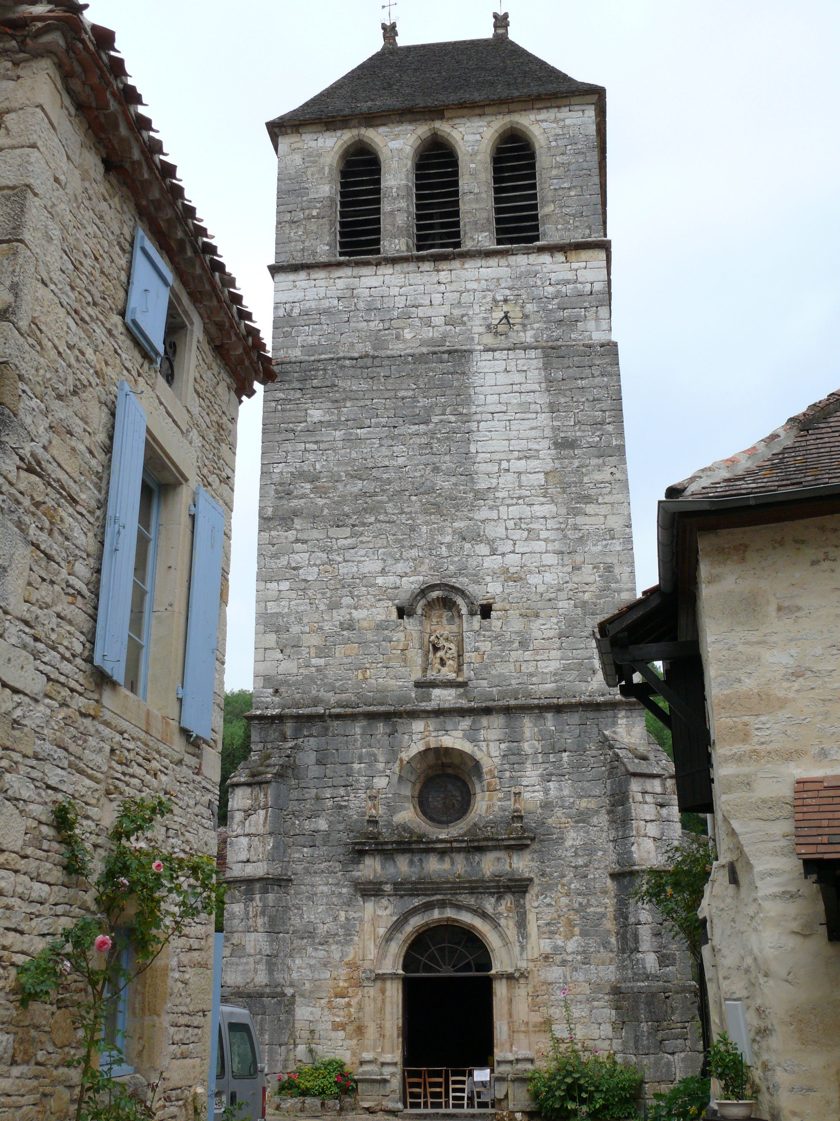 Lherm - Eglise Notre-Dame-de-l'Assomption - Clocher